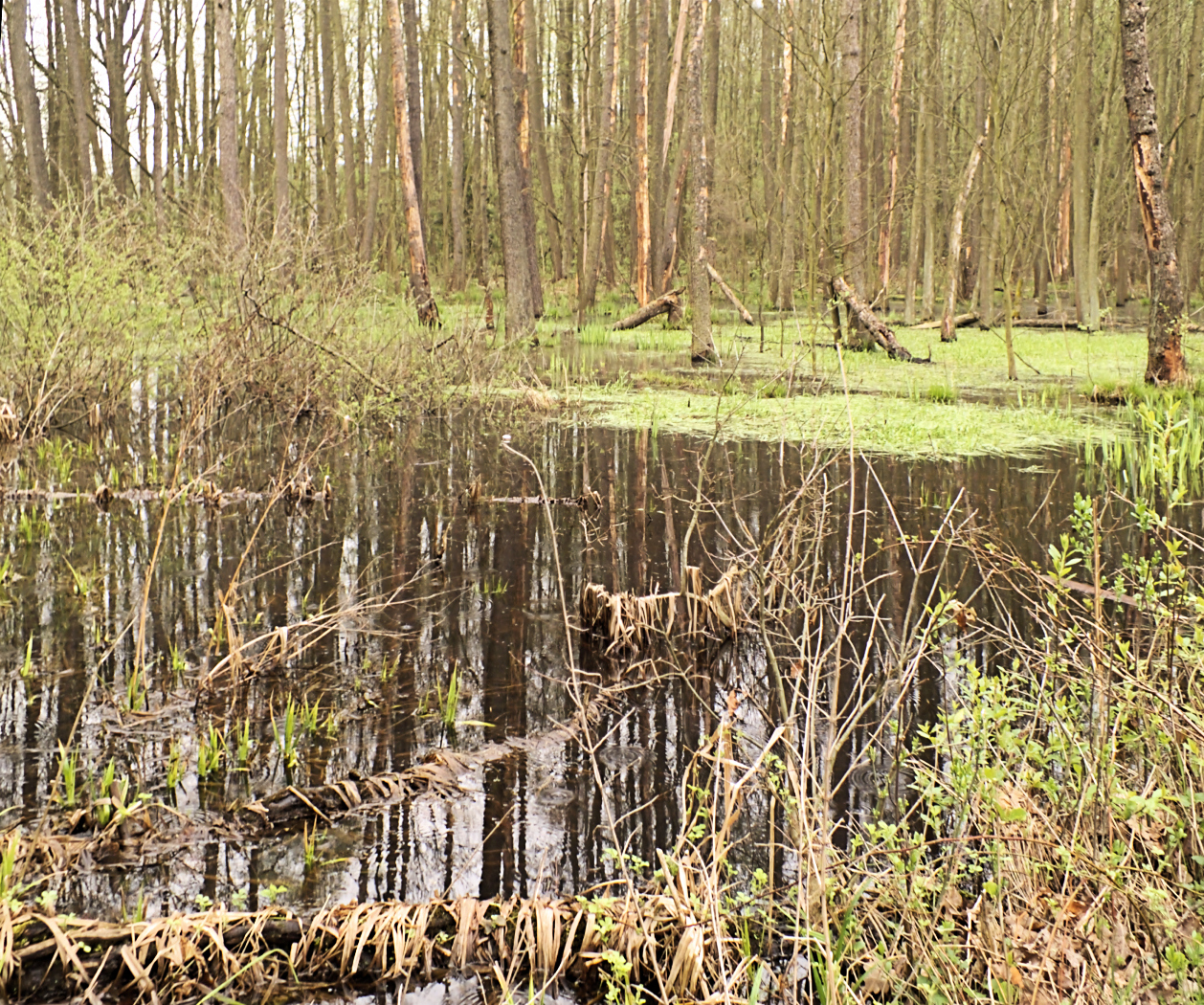 Rezerwat przyrody "Wydymacz"; (Nature reserve "Wydymacz")